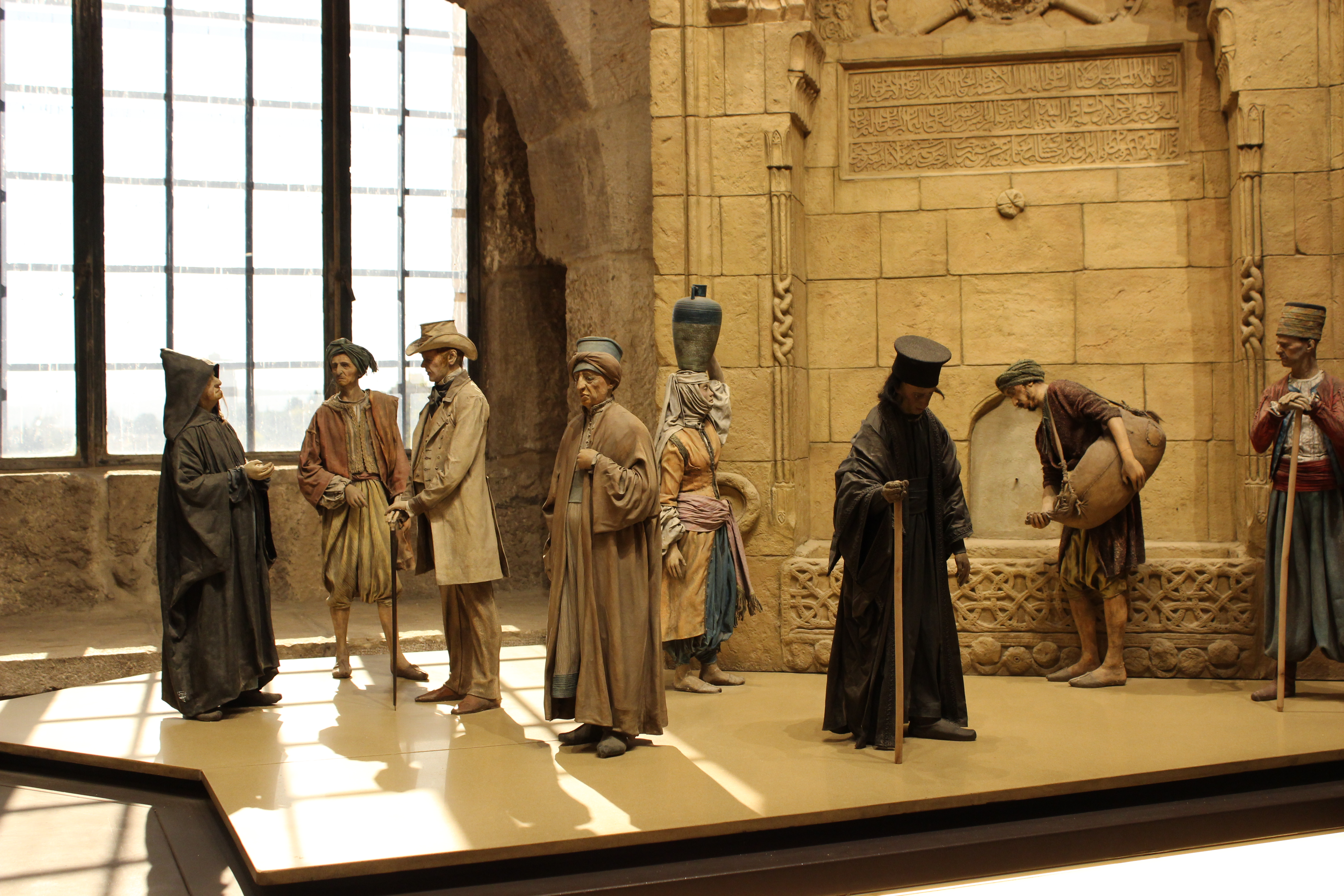 Jerusalem